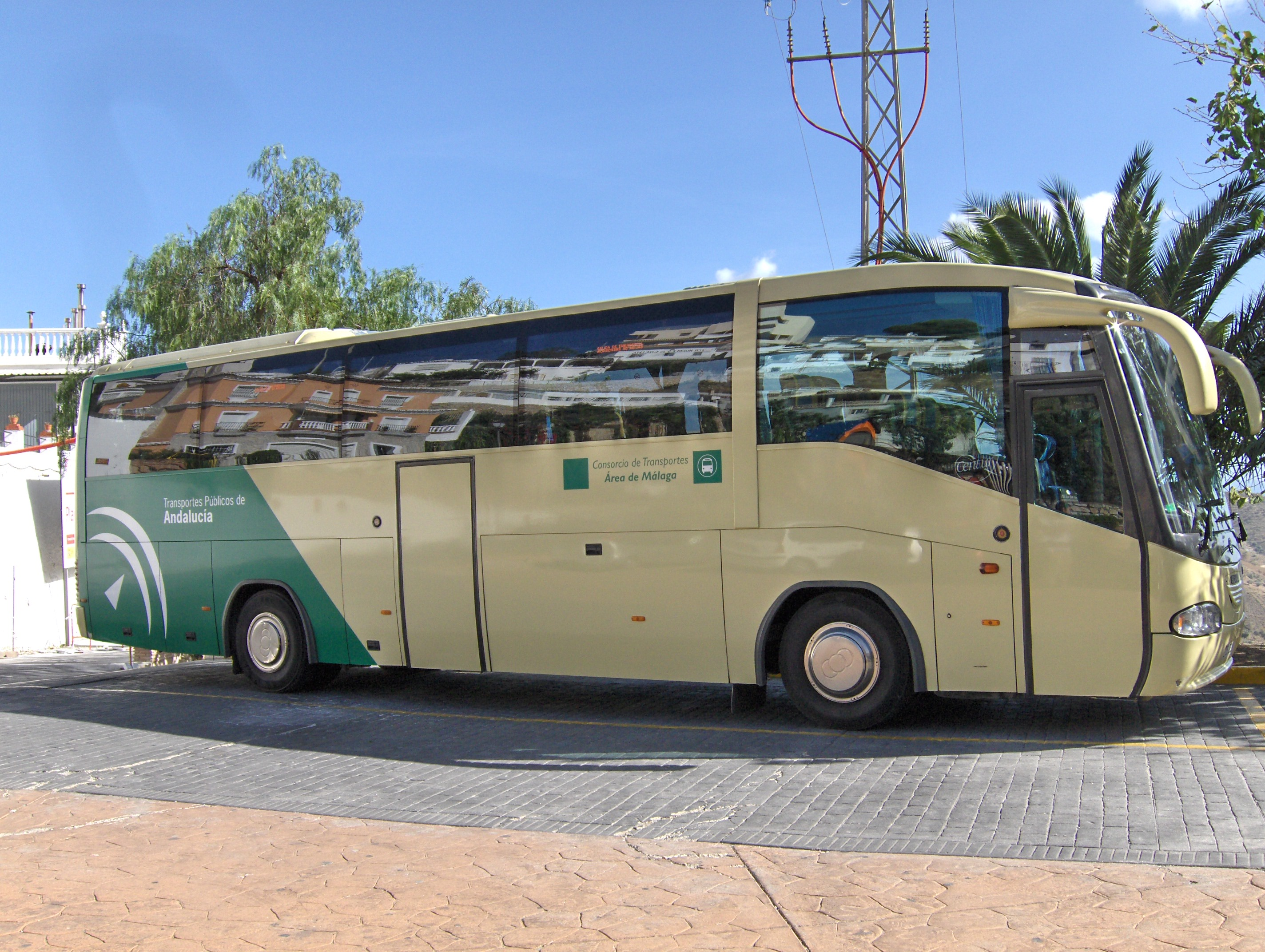 Autobús del Consorcio Metropolitano de Transportes del Área de Málaga estacionado en Moclinejo.